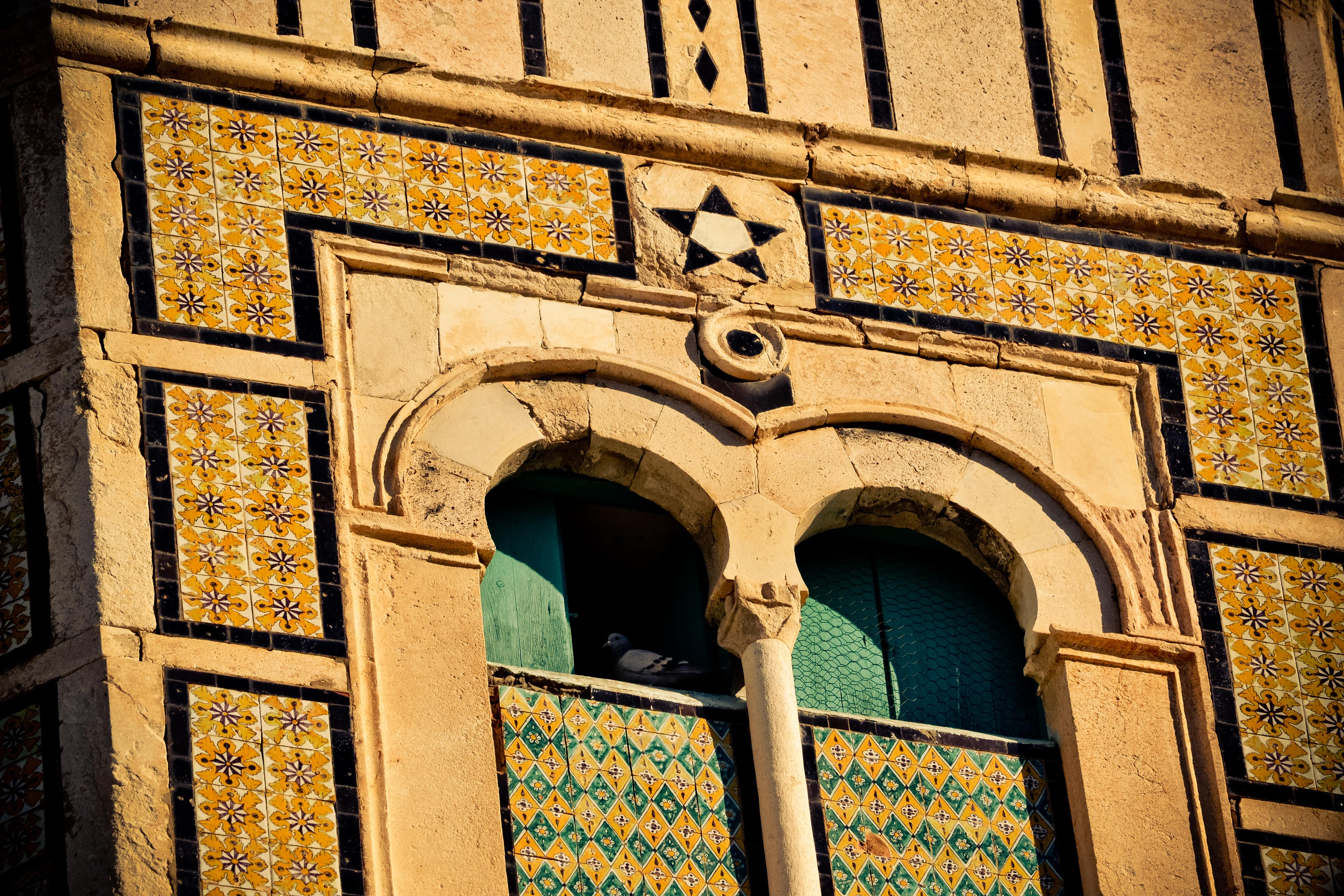 Grande mosquée, Testour